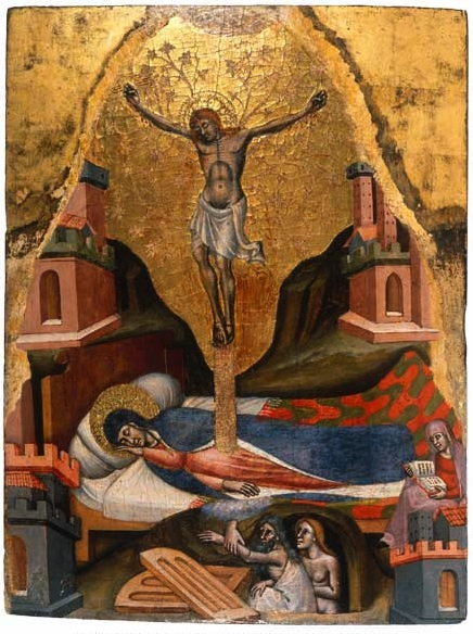 Rêve de la Vierge par Simone dei Crocifissi